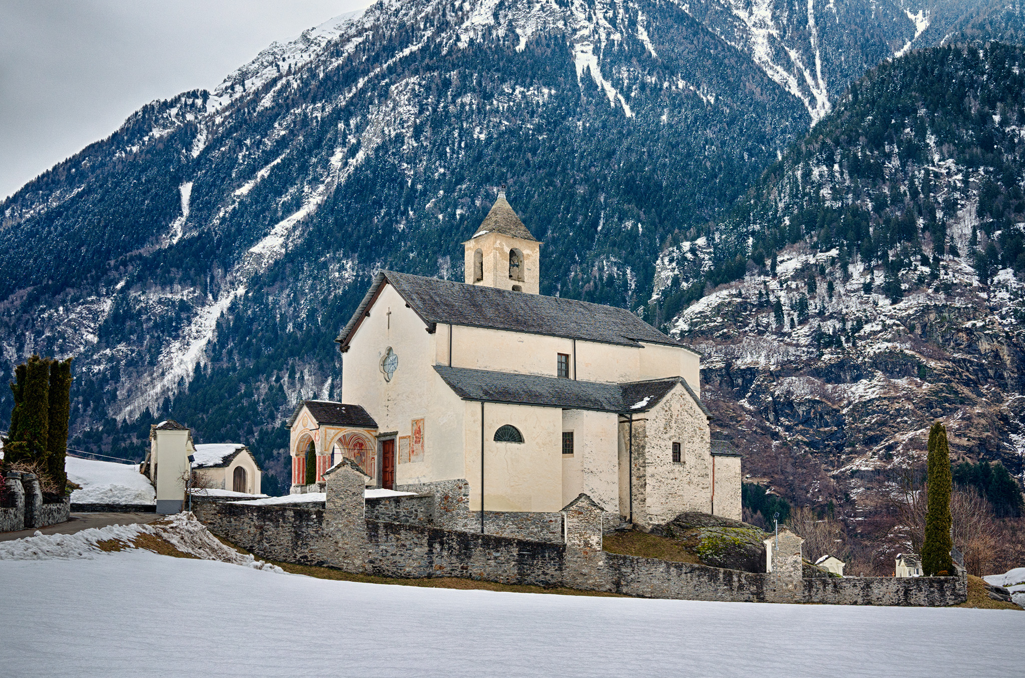 Chiesa parrocchiale dei SS.Nazario e Celso